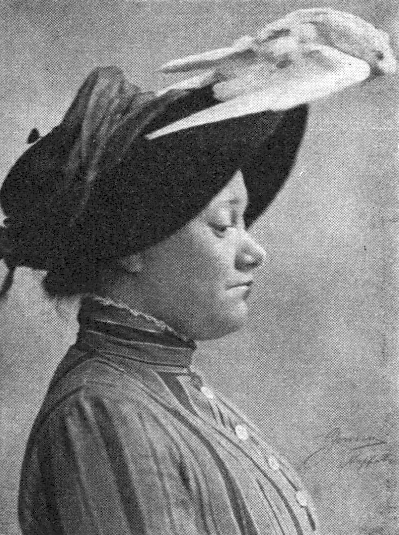 Zara Backman